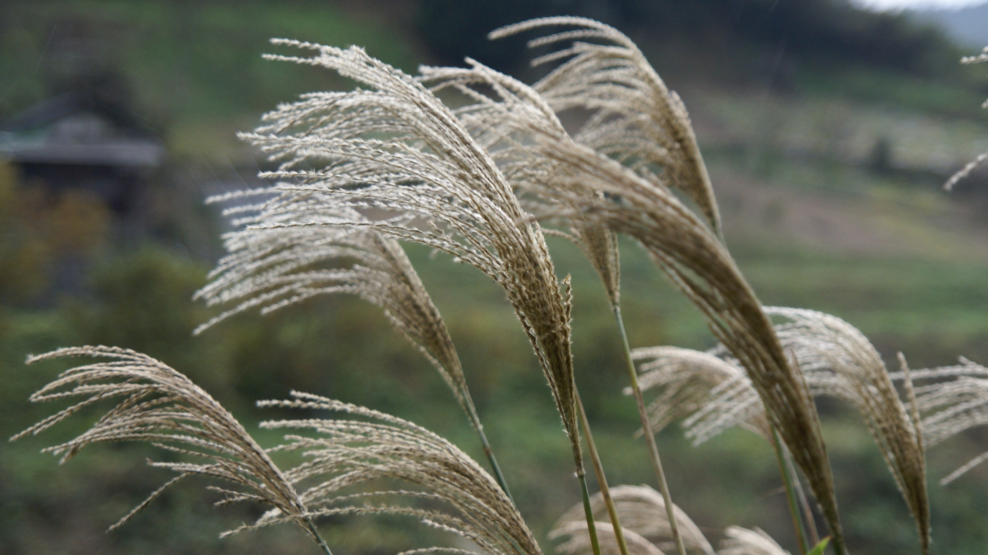 Miscanthus sinensis at Sakurai, Nara, Japan